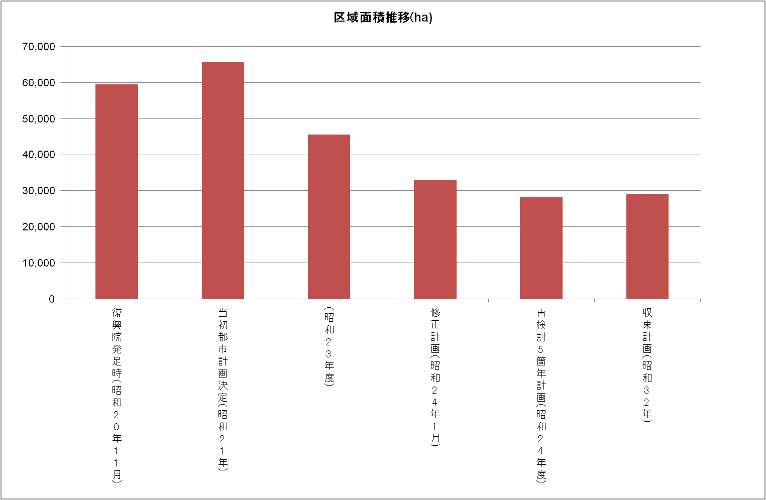 戦災復興土地区画整理区域面積推移（年次及び区域面積は戦災復興誌による）